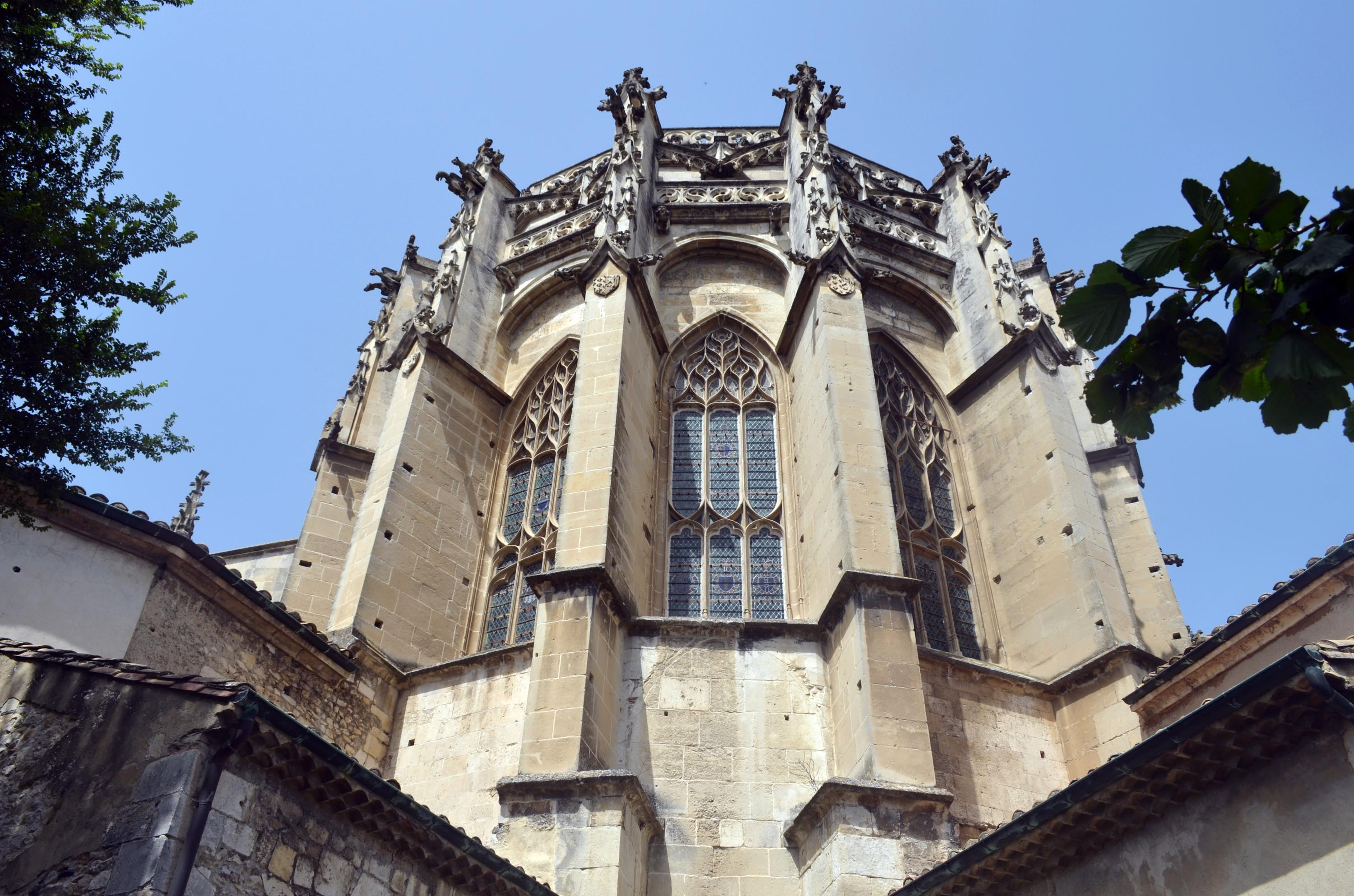 Cathédrale Saint-Vincent de Viviers (Ardèche), le chevet